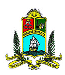 Escudo del municipio Santa Rita